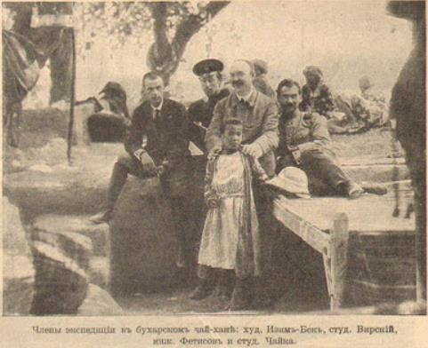 Світлина з дореволюційного журналу «Огонек» 1912р. Ф.А. Ізенбек в складі членів археологічної експедиції.